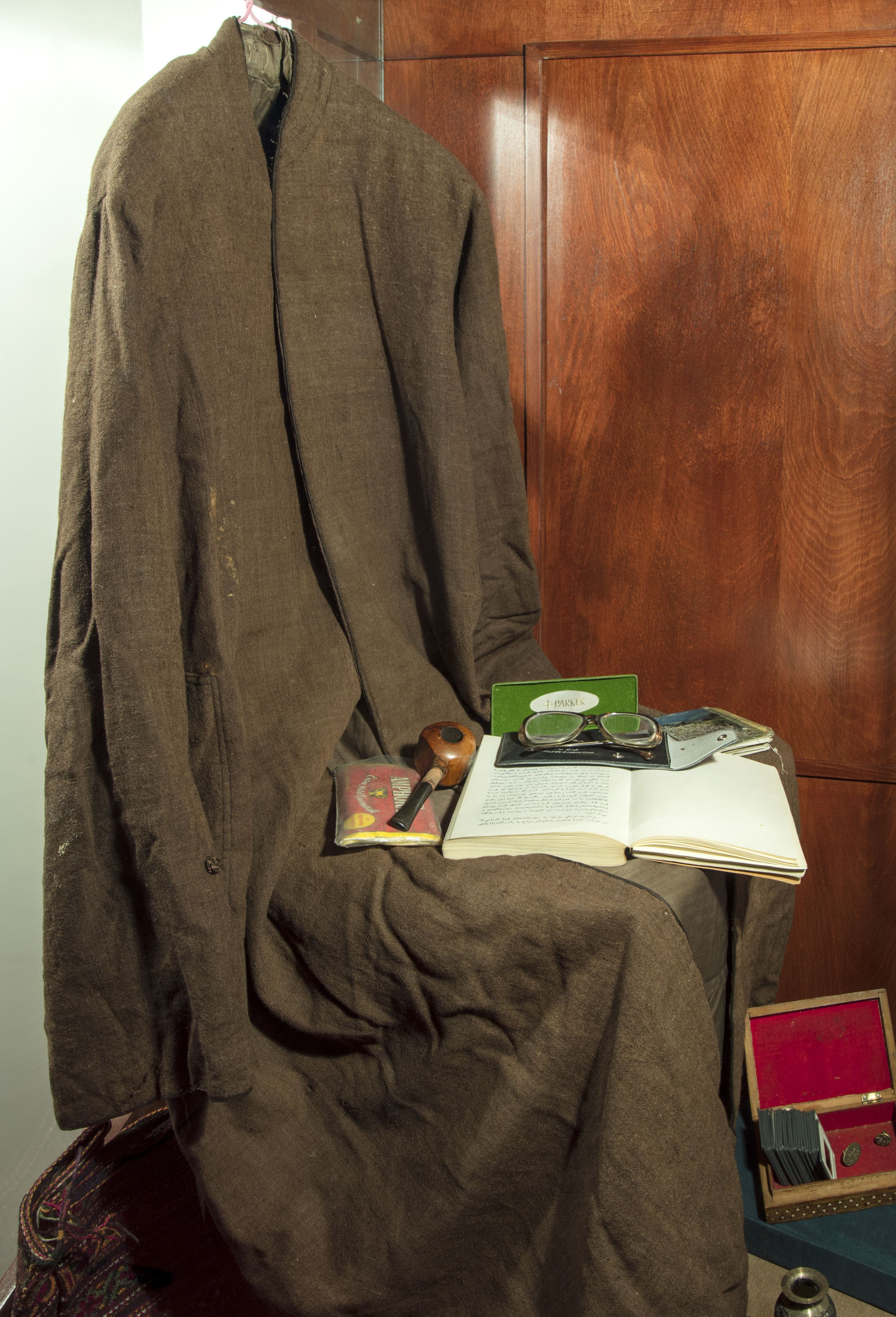 ویترین موزه